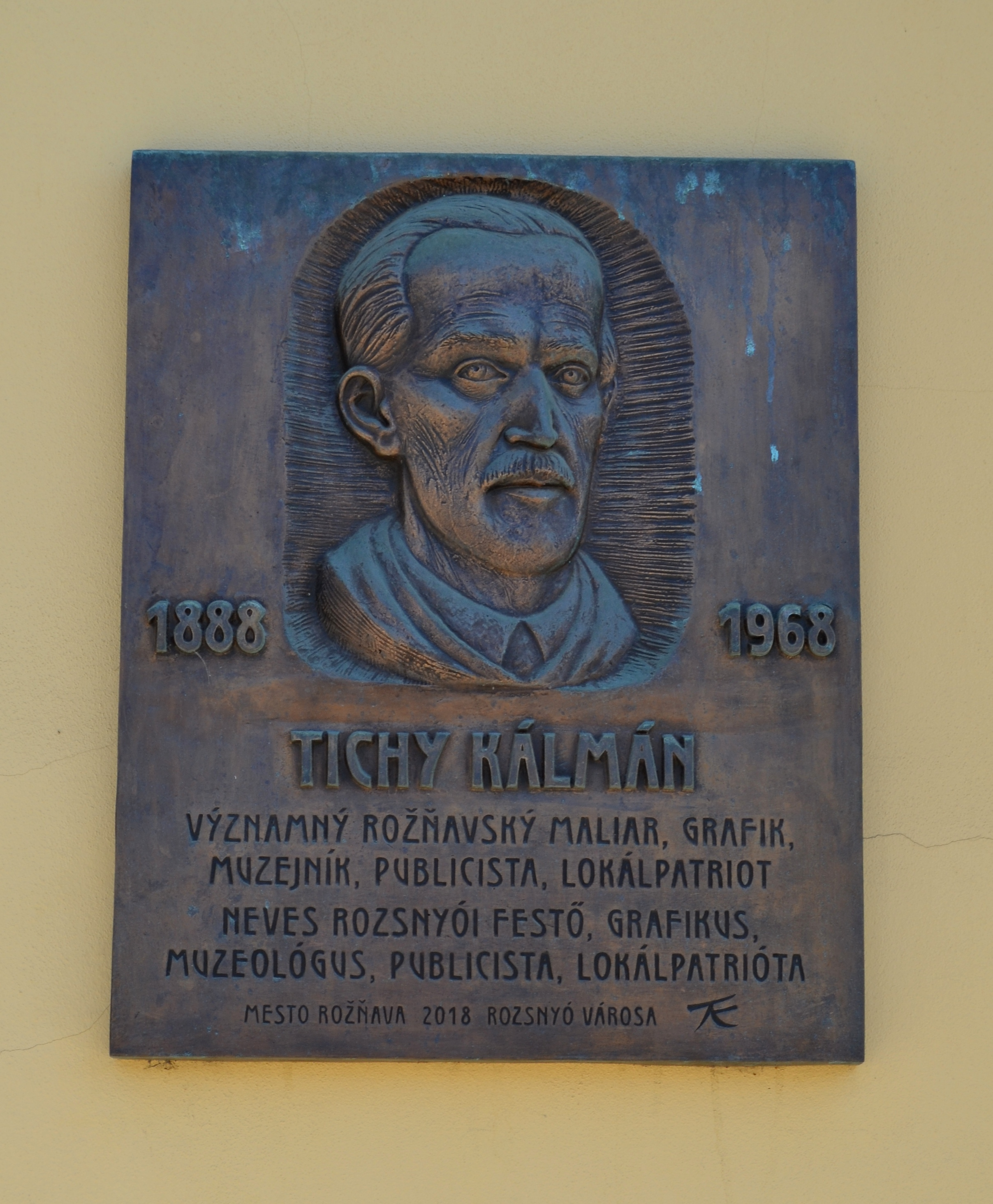 Pamätná tabuľa Kalmána Ticheho, rožňavského maliara, grafika, múzejníka, publicistu a lokálpatriota (na stene múzea)